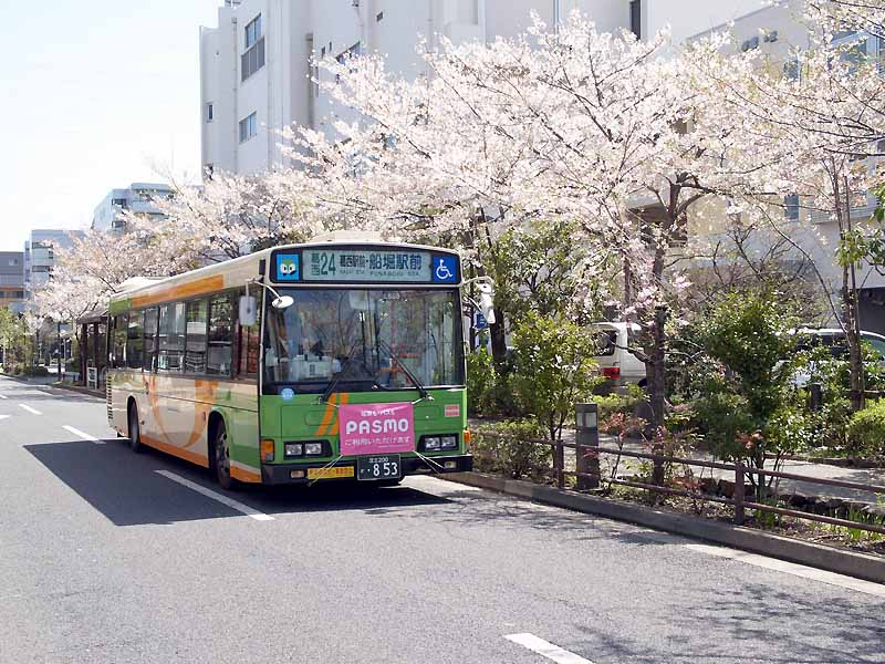 Toei Bus "Kasai 24" route at Kasai Kuminkan busstop. Model: Hino Rainbow HR (KL-HR1JNEE) License plate: TKA200KA-853（足立200か・853） Place: Naka-kasai, Edogawa-ward, Tokyo Japan